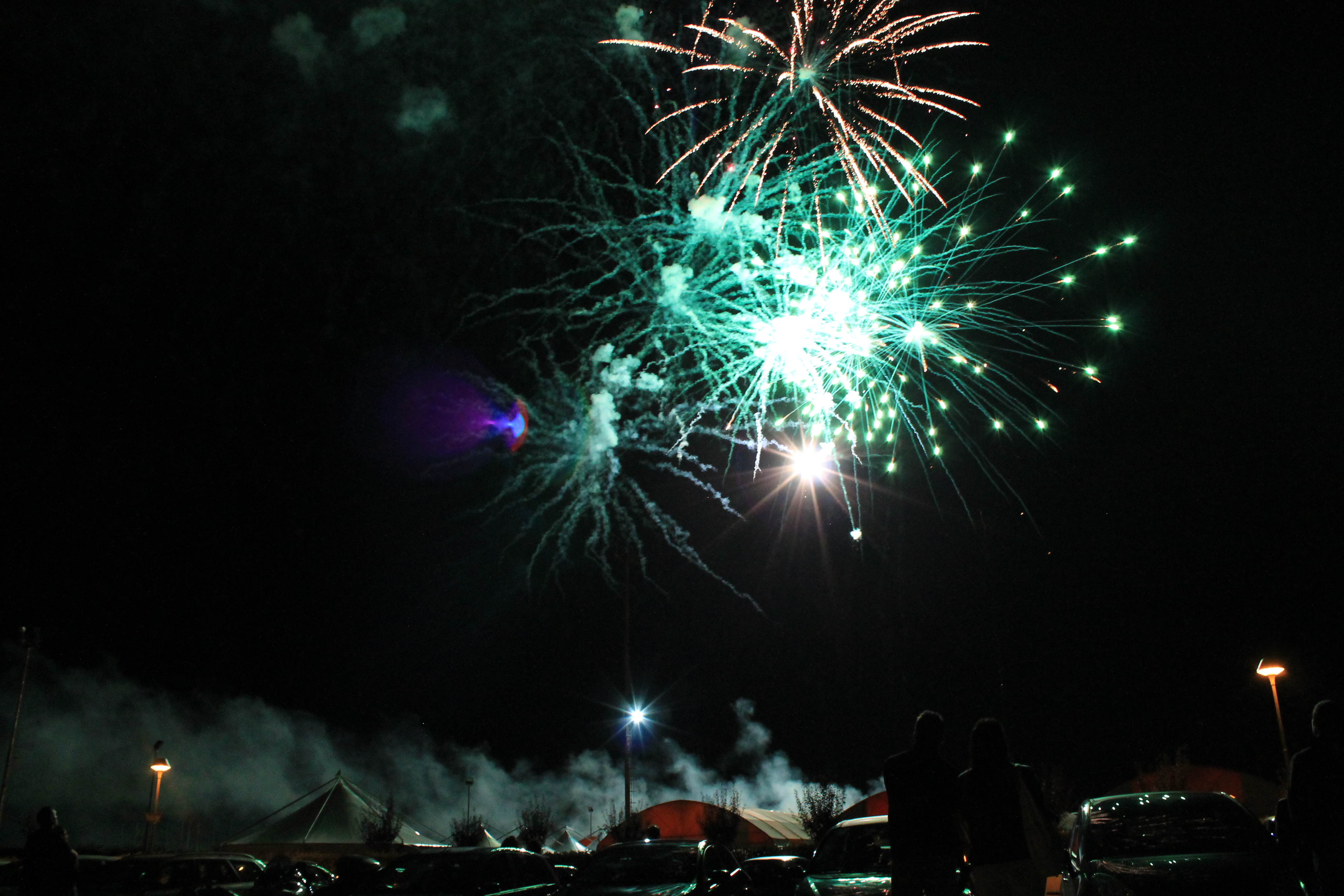 Foto di F. Curridor. Flaibano, foto dei fuochi d'artificio presso il parco festeggiamenti in occasione della sagra ...A Tutto Frico.